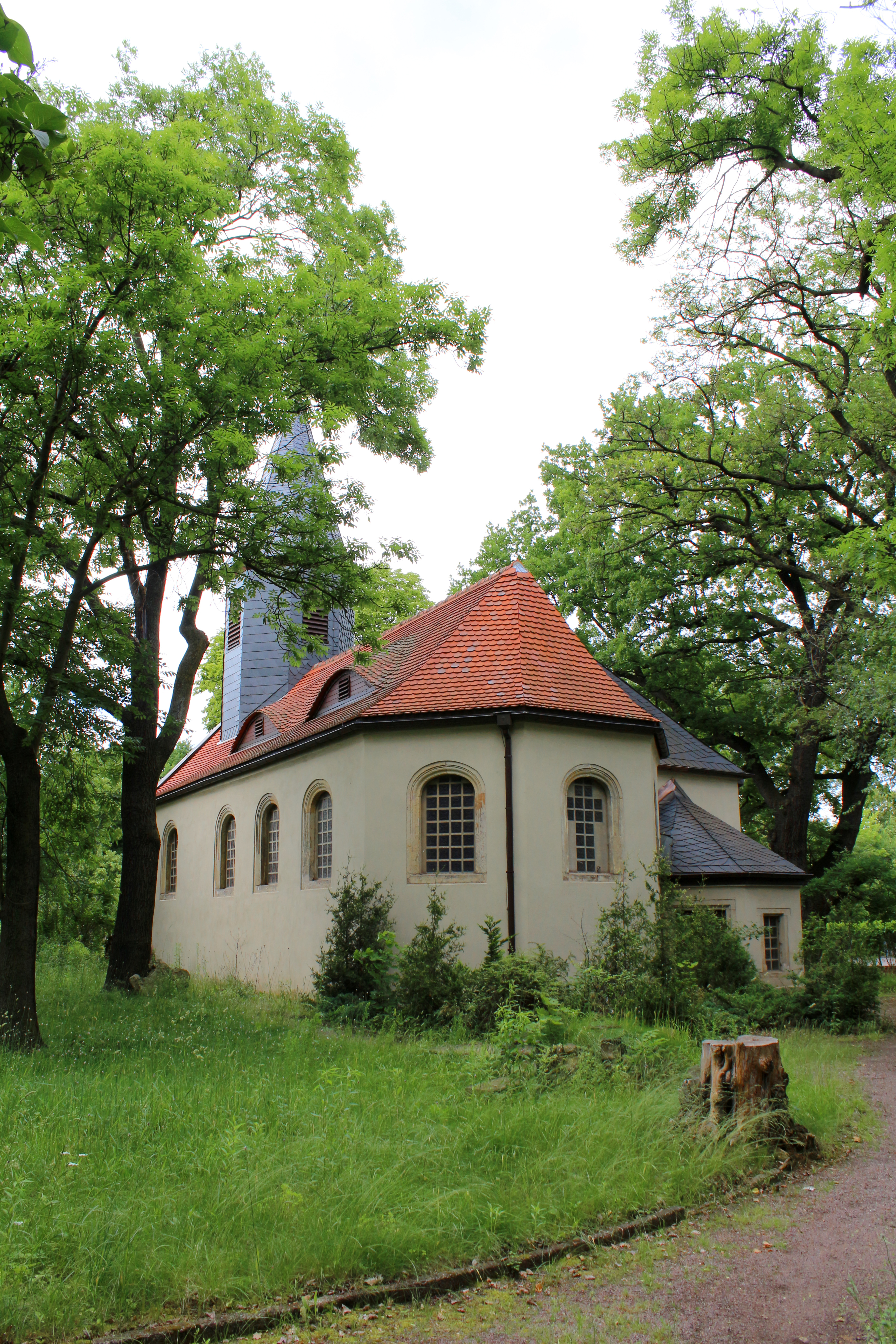 Kirche